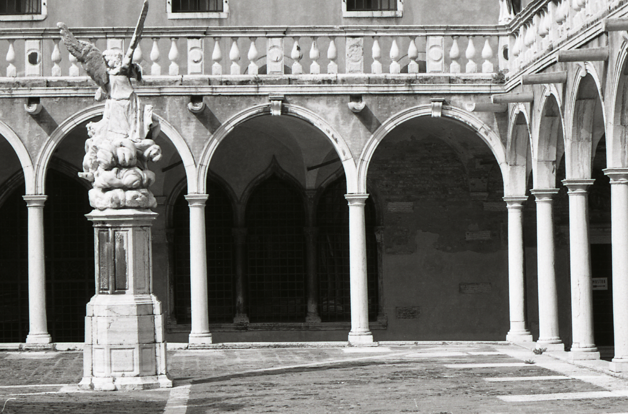 Servizio fotografico : Venezia, 1981 / Paolo Monti. - Strisce: 2, Fotogrammi complessivi: 12 : Negativo b/n, gelatina bromuro d'argento/ pellicola ; 35 mm. - ((Sul portanegativi: N[I]K[MA]T FP4 e iscrizione: "Frari e Chiostro 27-38". - La serie è identificata da Monti con segni grafici e distinta dalla precedente e dalla successiva. - Occasione: Seminario di fotografia a Palazzo Fortuny e Documentazione per la pubblicazione: Crivellari Domenico (a cura di), Venezia, Milano, Electa, 1982. - Fonte: Agenda di Paolo Monti: Nikon Leika 3001-/ Monti 1978 (1978-1982), presso Archivio Paolo Monti. - Fonte: Monografia di Crivellari Domenico (a cura di): Venezia, Milano, Electa (1982)